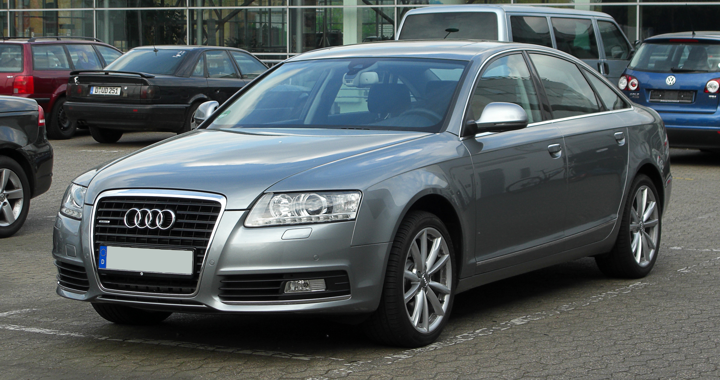 Audi A6 (C6, Facelift)